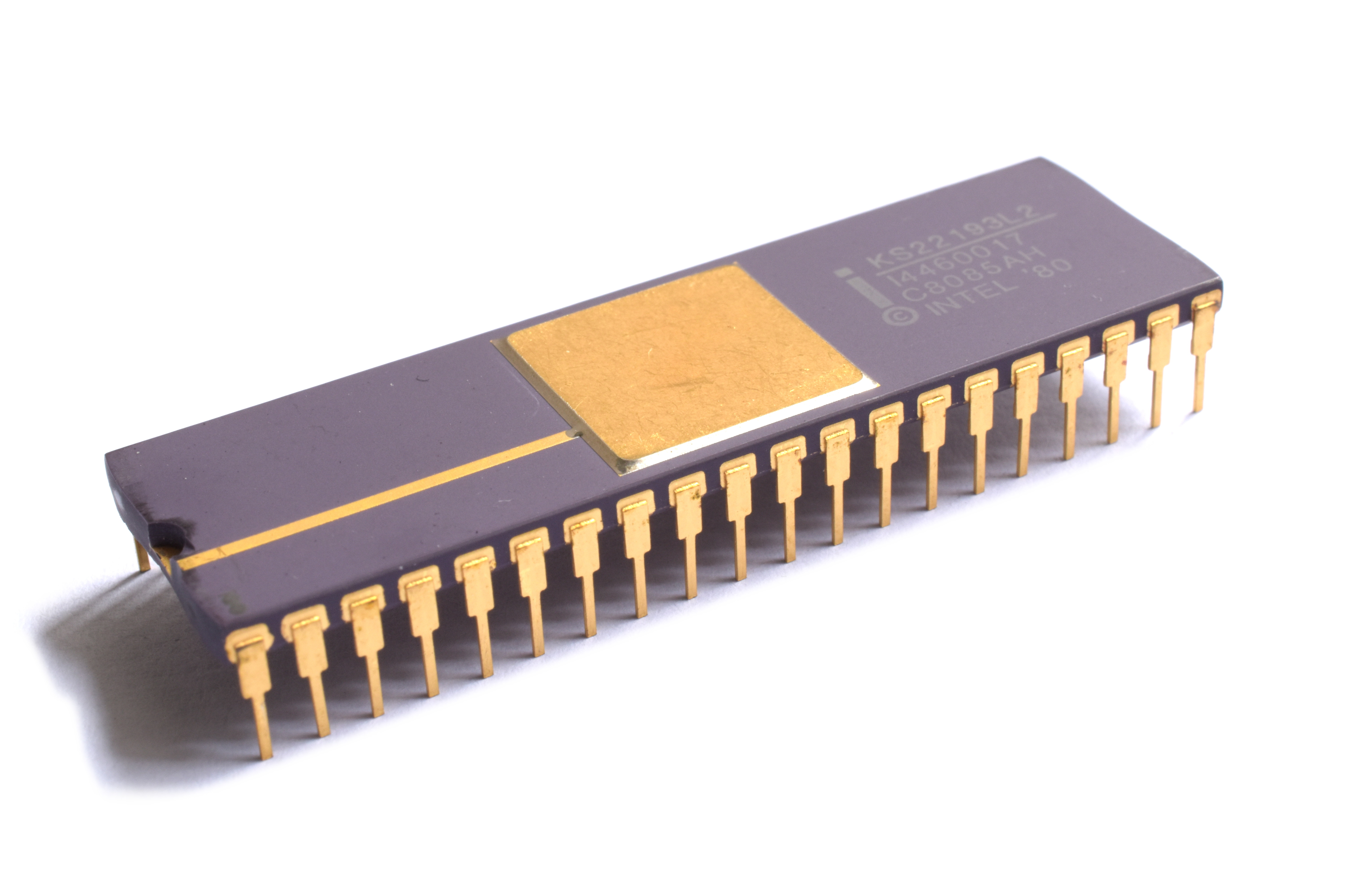 Procesoro Intel C8085AH.